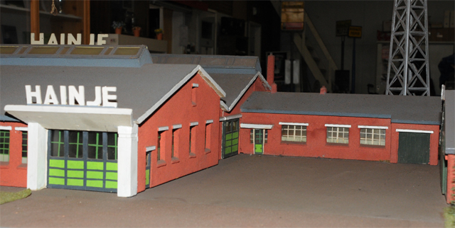 Maquette carrosseriefabriek Hainje te Heerenveen. Deze maquette werd ter gelegenheid van 50 jaar carrosseriefabriek Hainje in 1957 gemaakt. Deze maquette is overgedragen aan het Nationaal Bus Museum te Hoogezand.